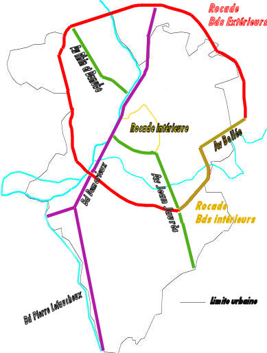 Une carte représentant quelques une des voies importantes permettant de circuler dans la ville du Mans.